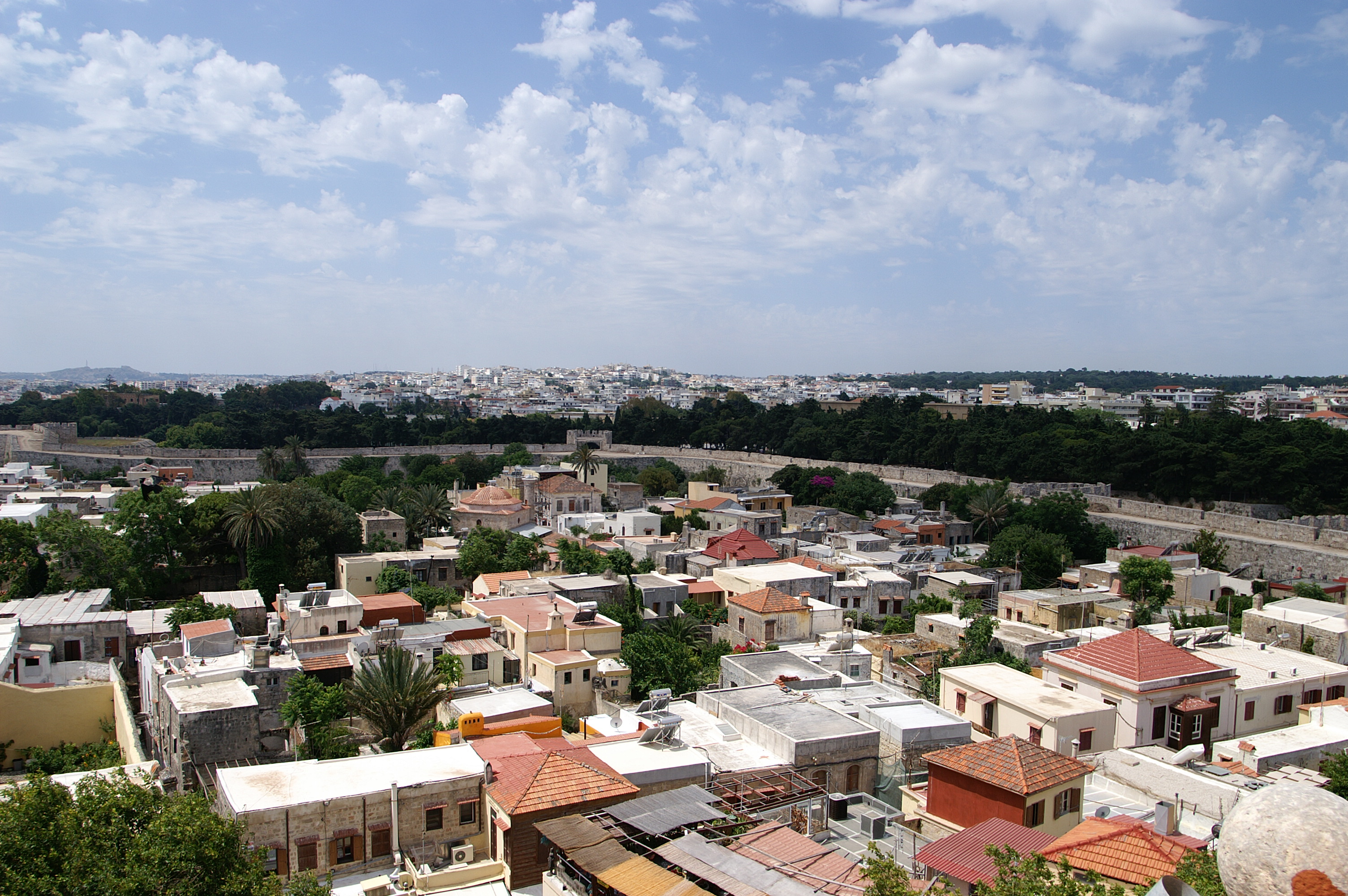 Blick vom höchsten Punkt auf dem Glockenturrm des "ROLOI" Uhrturm in der Altstadt von Rhodos.